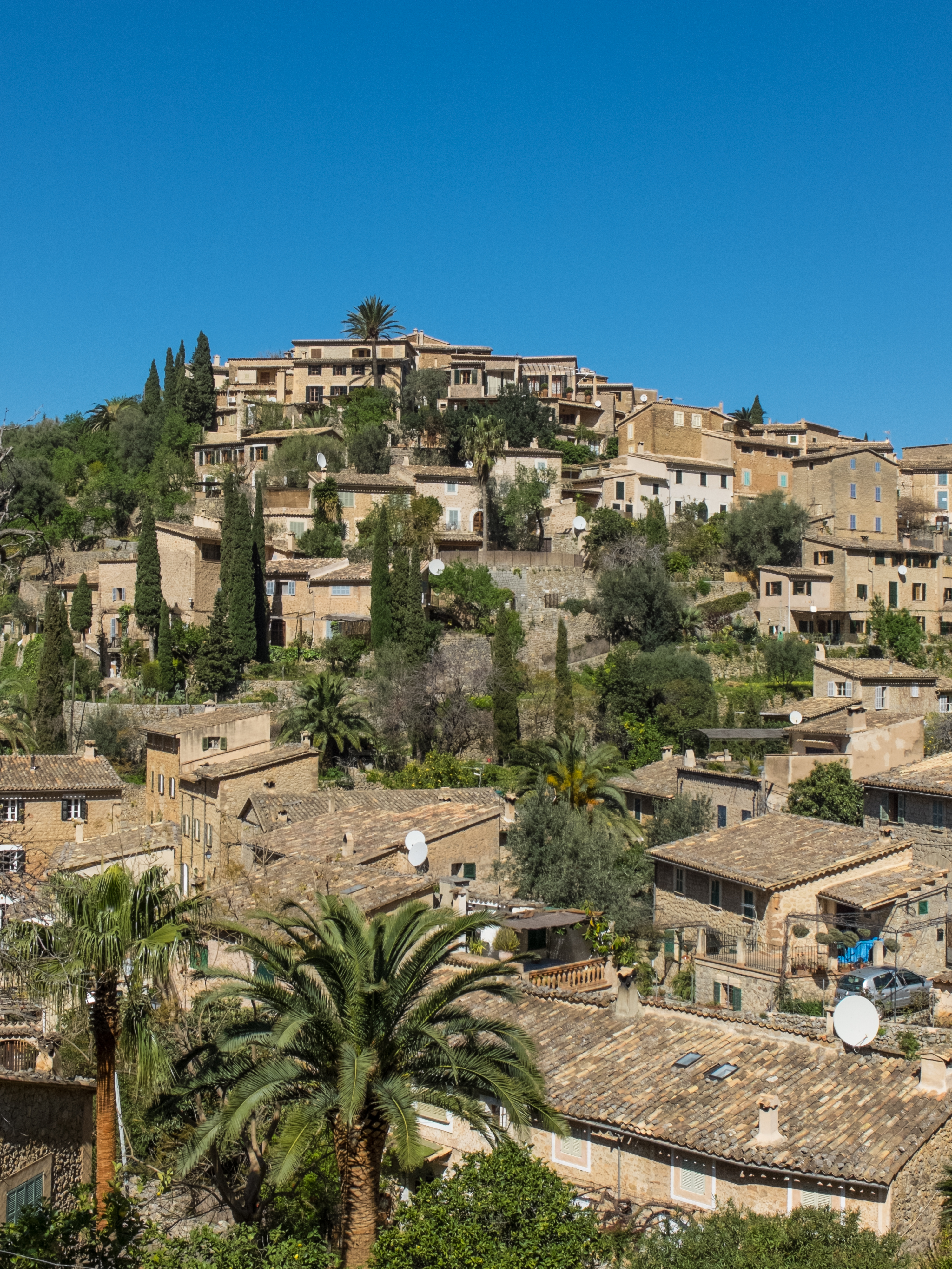 Deià, Mallorca